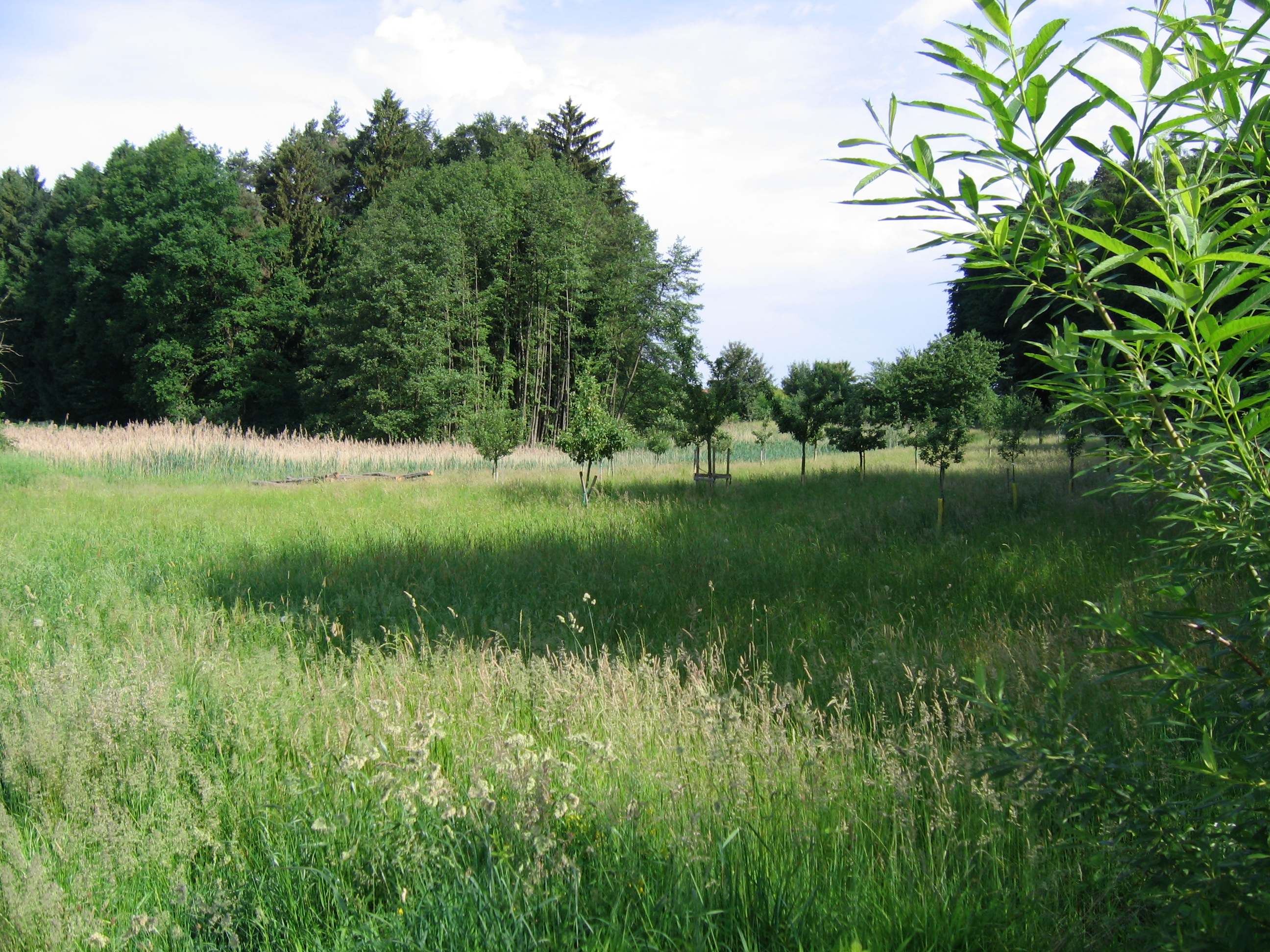 Deutschland - Bayern - Landkreis Lindau (bodensee) - Wasserburg (Bodensee): Streuobstwiese